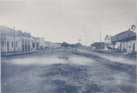 Imagem de Sapé em 1922